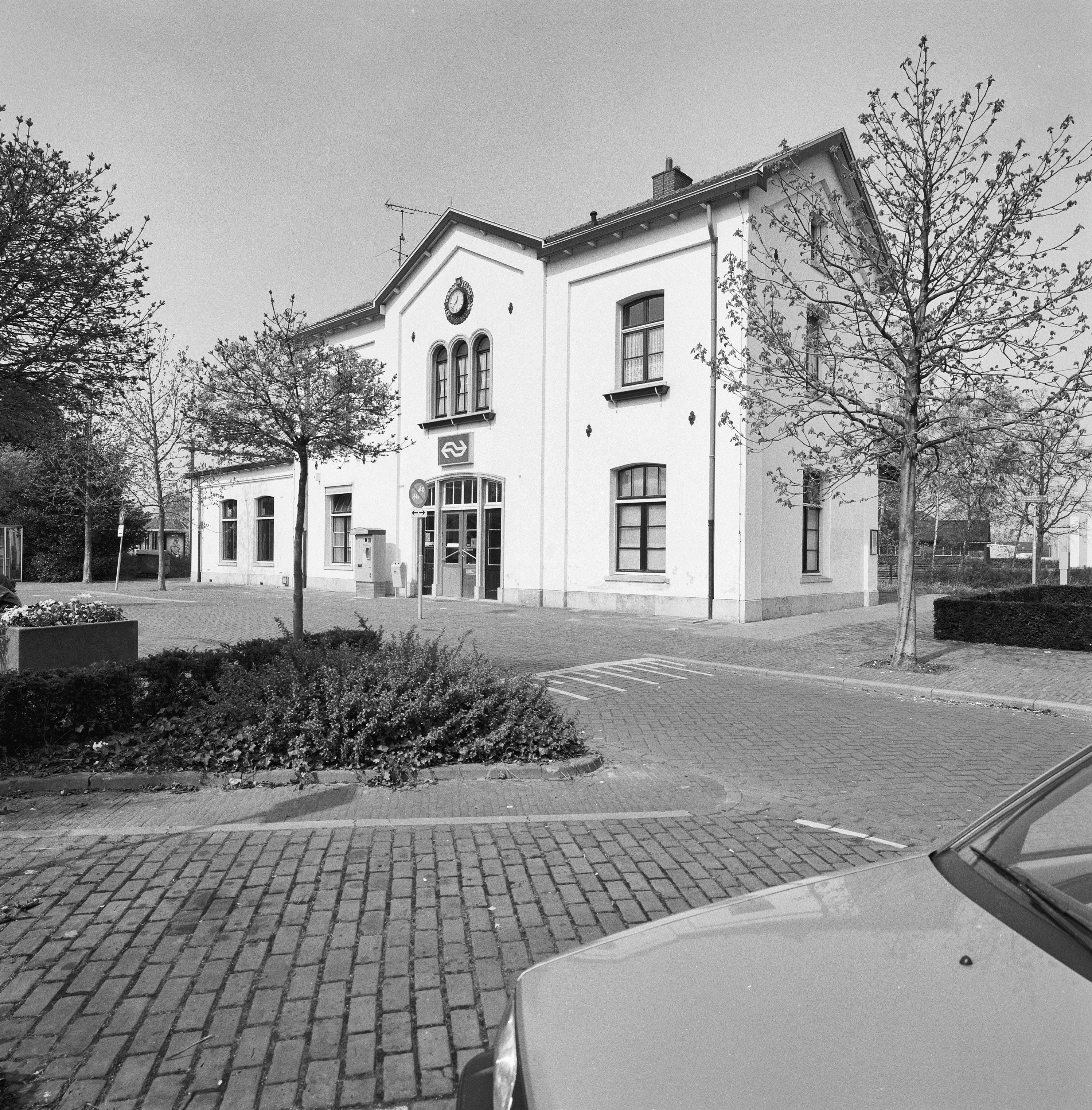 Station: Overzicht voorgevel en rechter zijgevel, station (opmerking: Gefotografeerd voor Monumenten In Nederland Noord-Brabant)